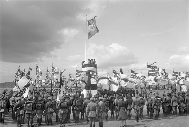 Der grosse 13. Frontsoldatentag des Stahlhelms im Zentralflughafen in Berlin, an über 150 000 Stahlhelmer nahmen an dem Aufmarsch teil ! Feierliche Weihe von über 200 neuen Fahnen und Standarten vor den Führern des Stahlhelms, Seldte und Düsterberg.